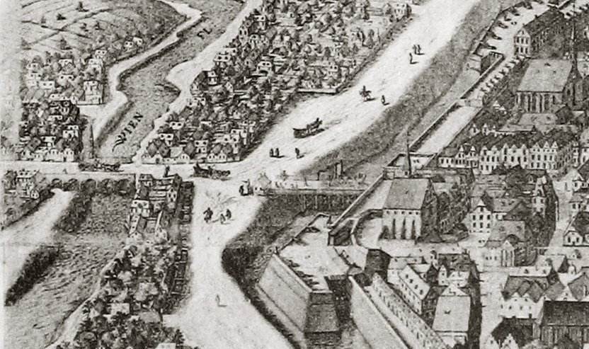 Ausschnitt aus Wienplan von 1609